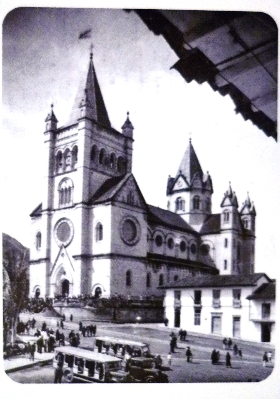 Anterior catedral de Sonsón construida en granito.